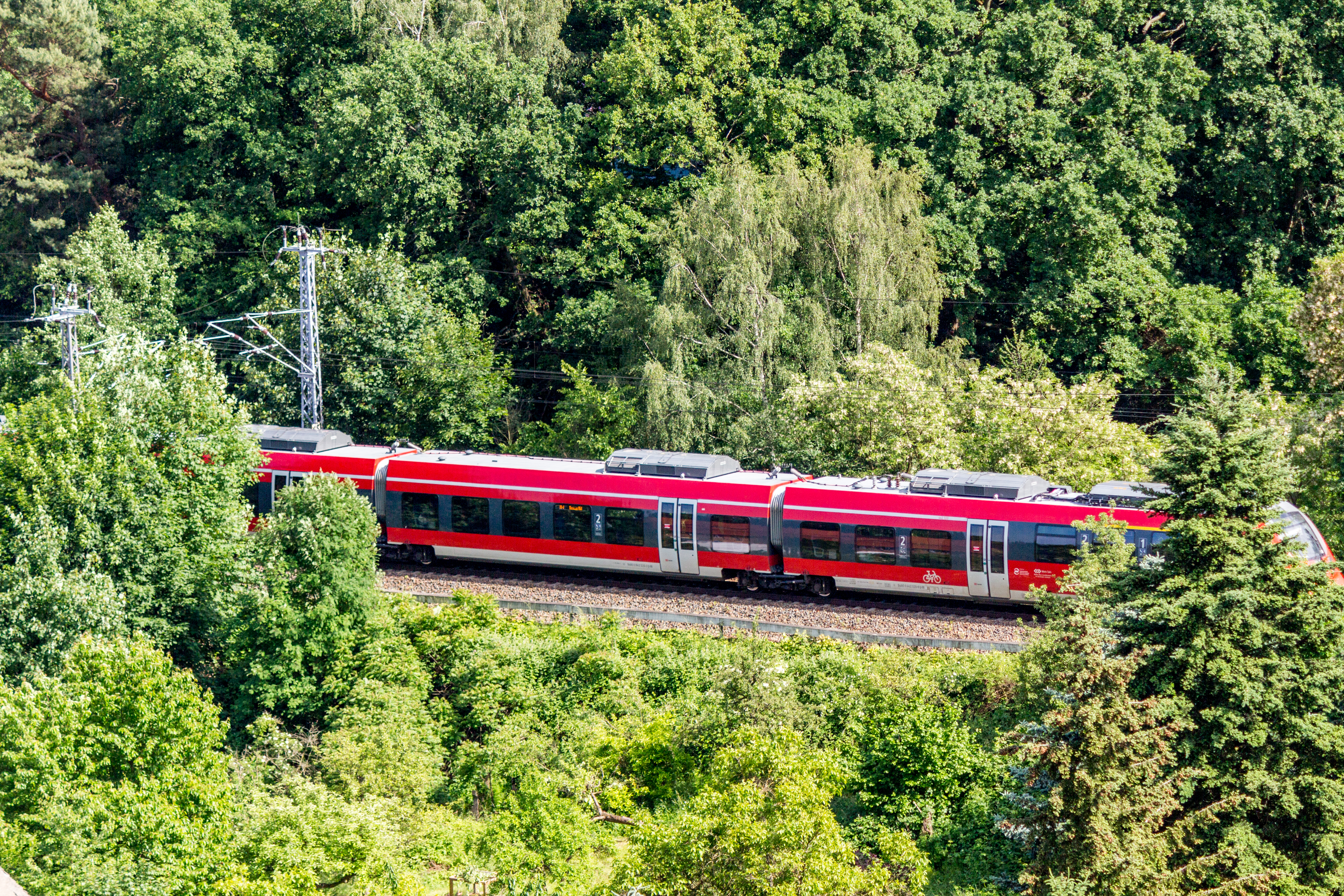 Regionalbahn bei Bad Belzig im Naturpark Hoher Fläming